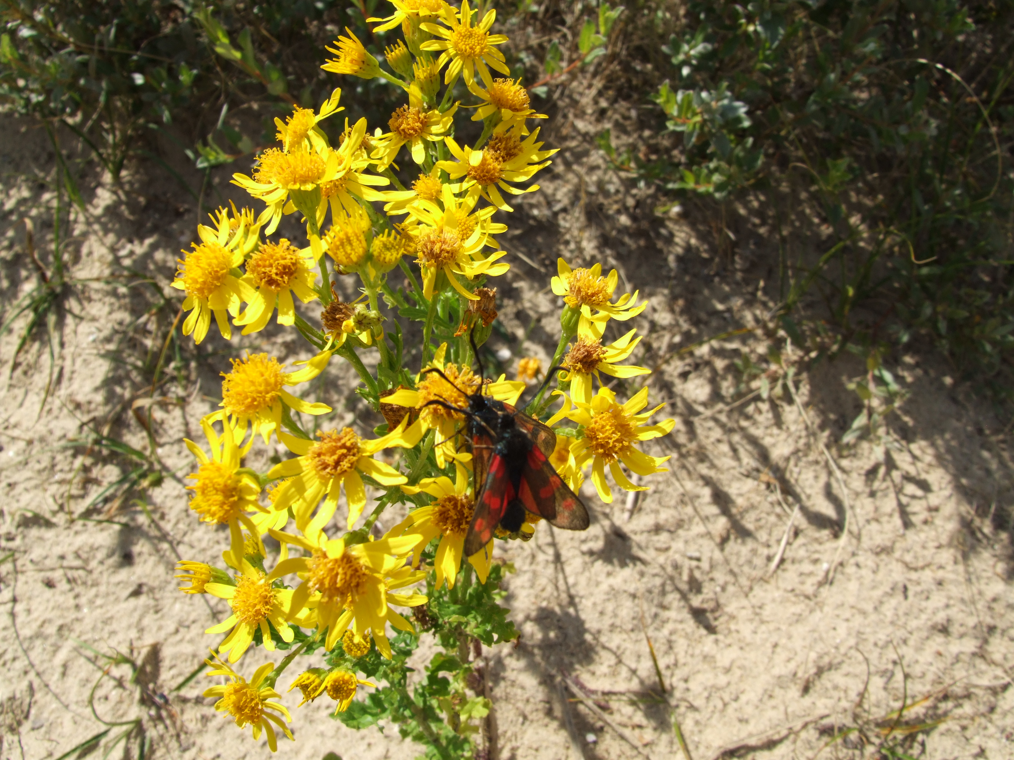 Senecio jacobaea - Le Sénécon jacobée - Jakobs-Greiskraut Jacobskuiskruid - Ort: Dune du Perroquet, Bray-Dunes, Frankreich - Blütenstand mit Blüten verschiedener Reifestadien